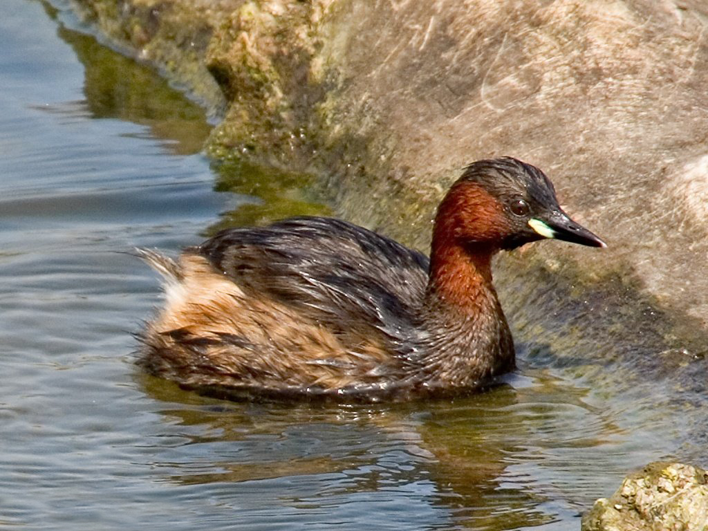 01603 Dodaars / Little Grebe